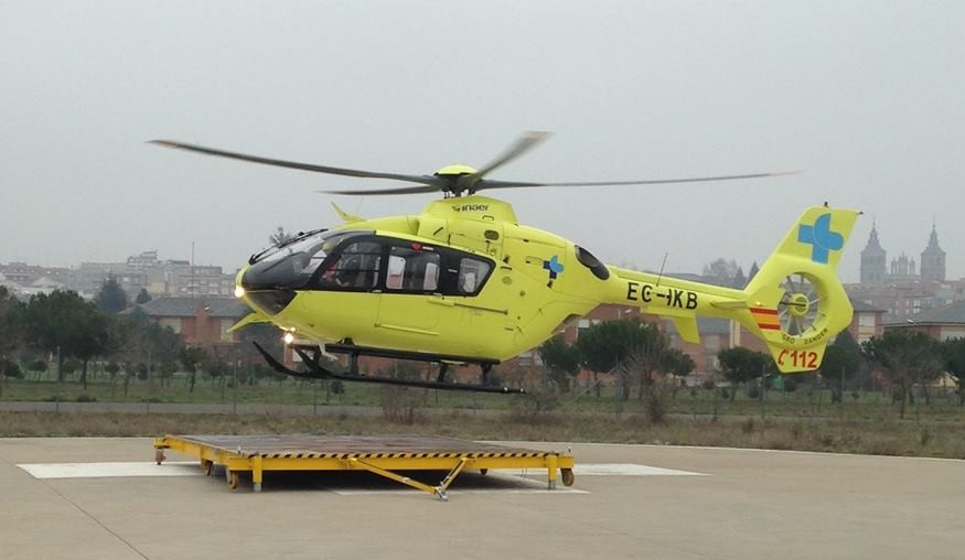 Helicoptero SACyL con nueva rotulación